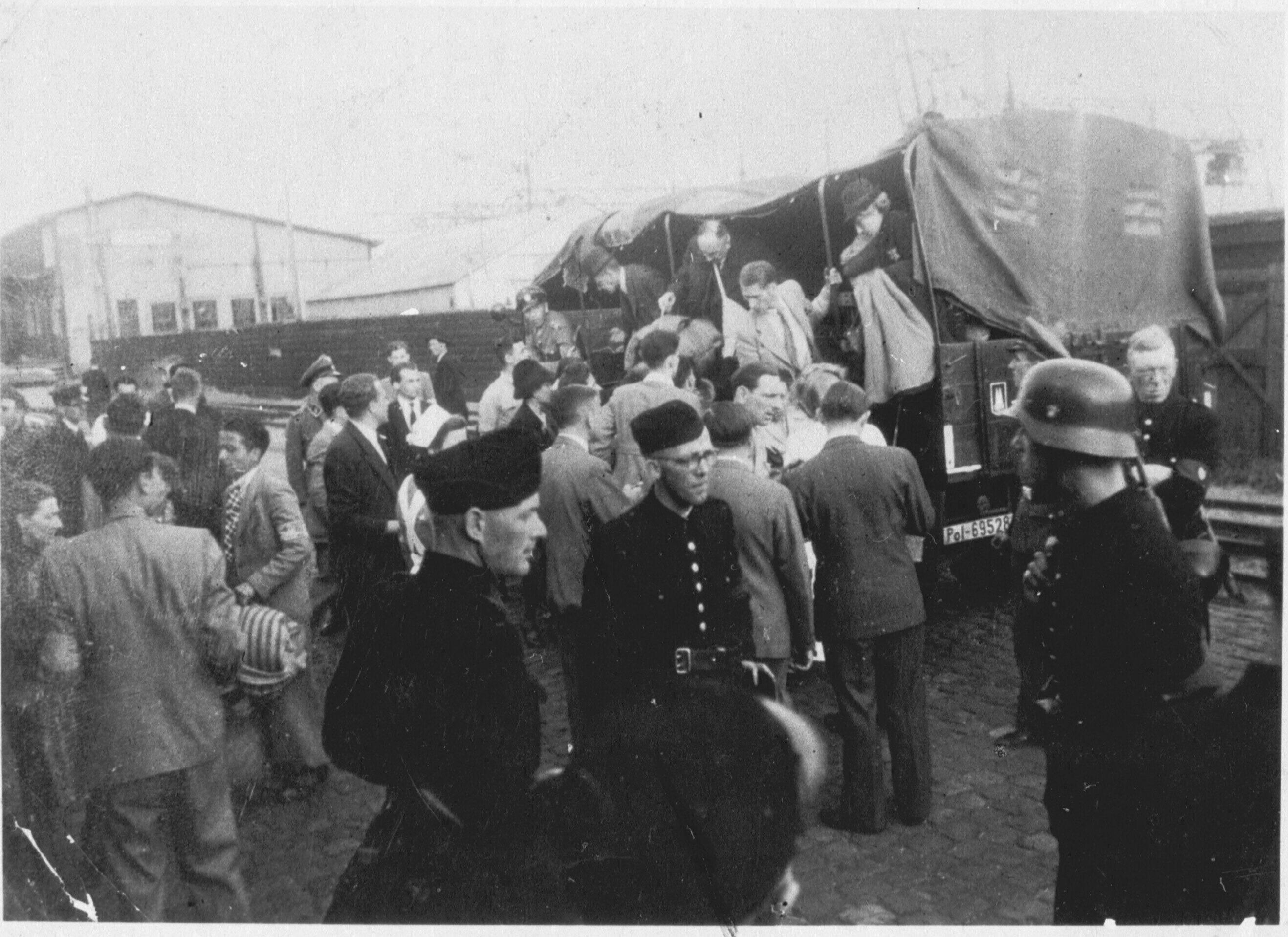 Deportatie Joden, zomer 1943. Panamakade, Oostelijk Havengebied, in Amsterdam. Het gebouw is Loods III.